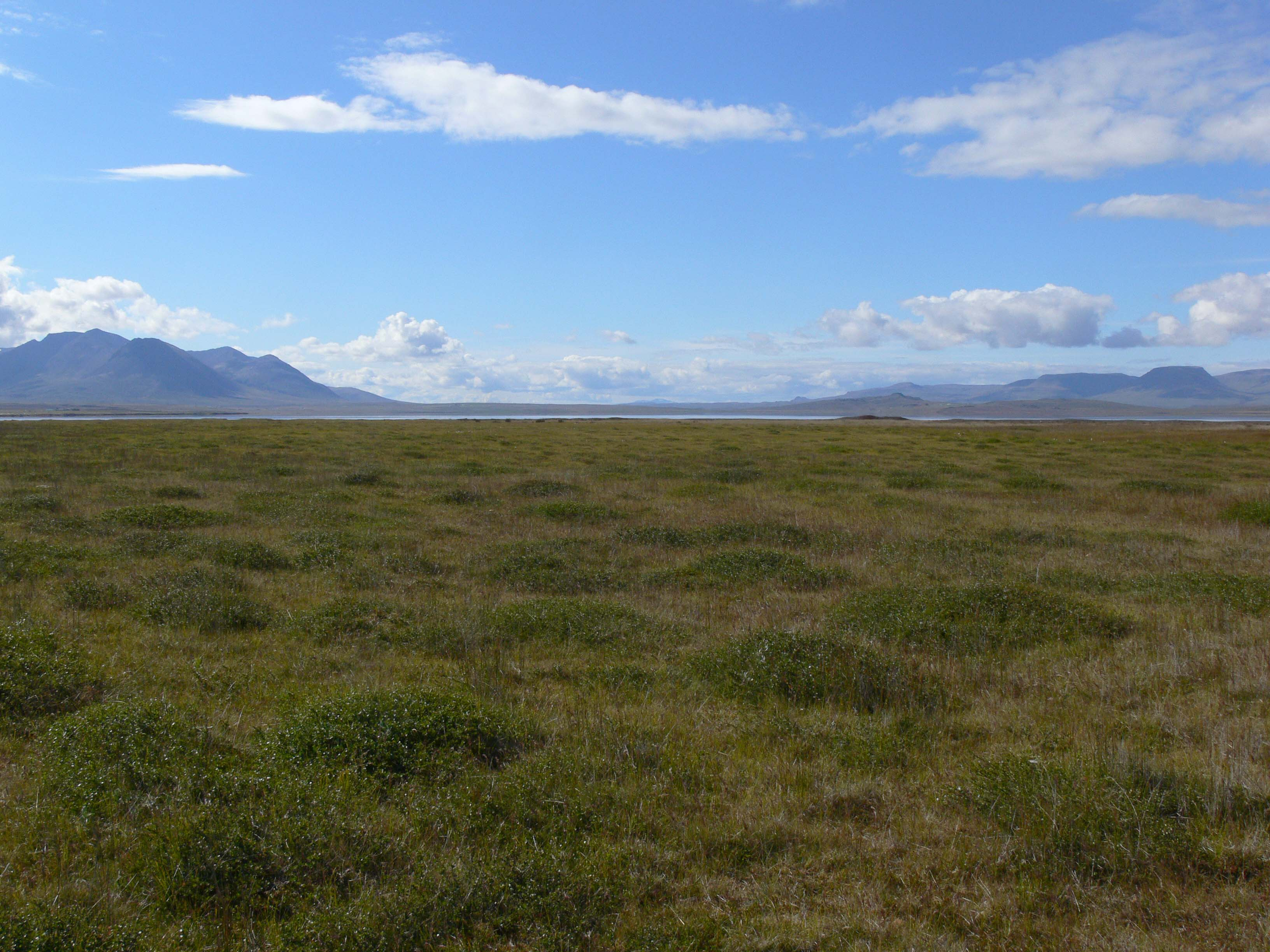 Viðidalur in Nordisland.